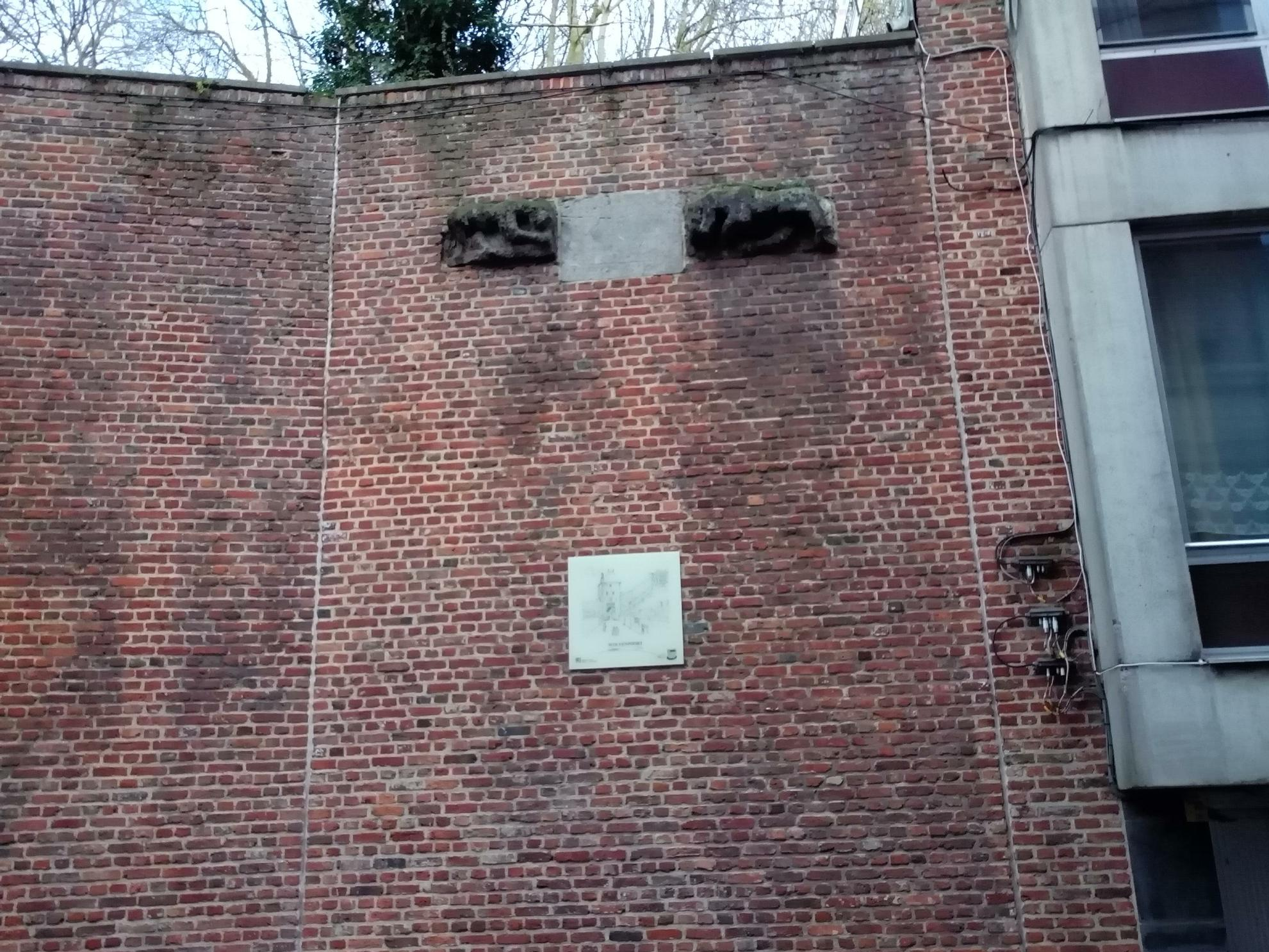 Schapenstraat, Leuven. Gedenksteen van de vroegere Porta Luporum (Wolvenpoort)